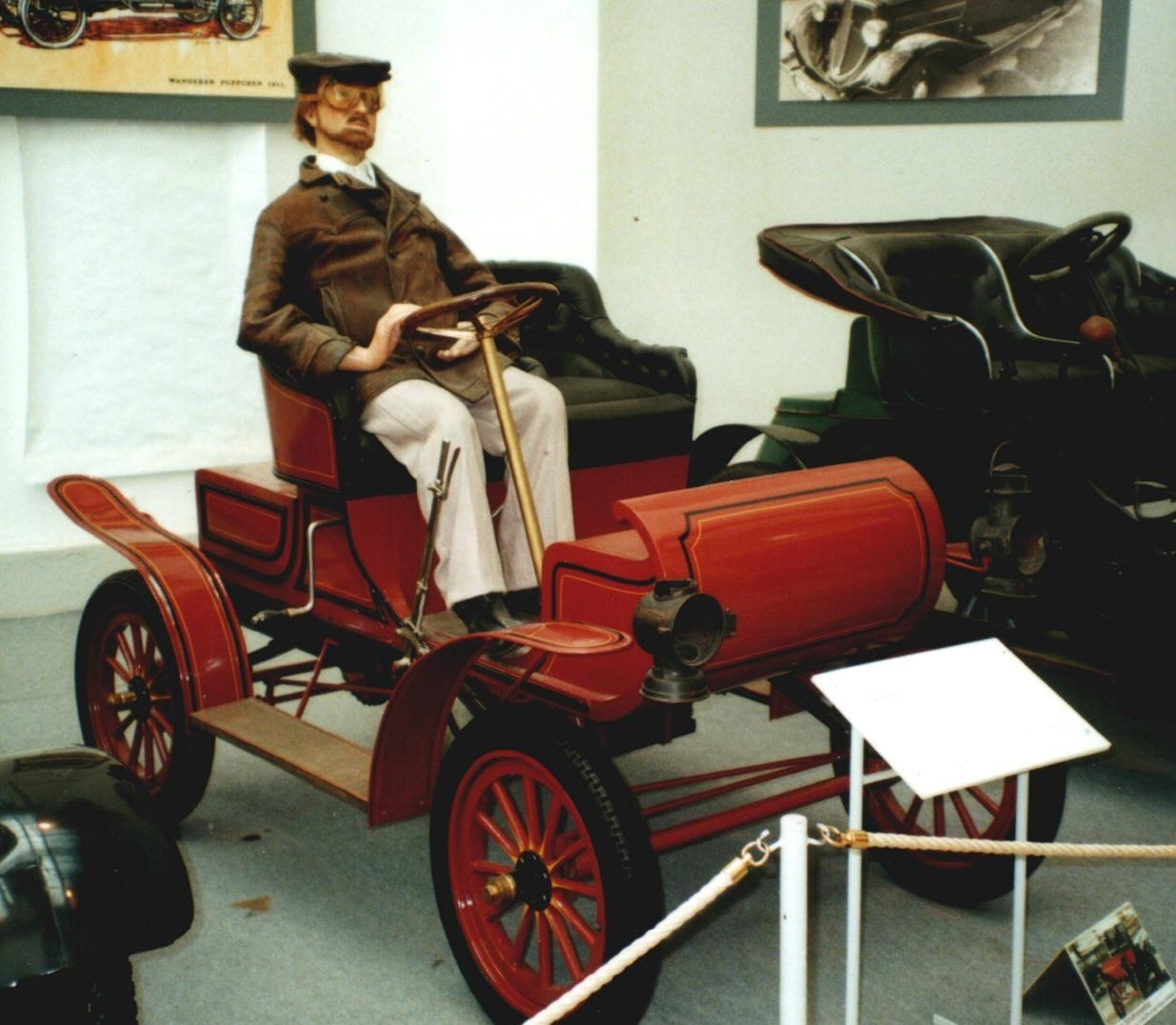 Excelsior 1904